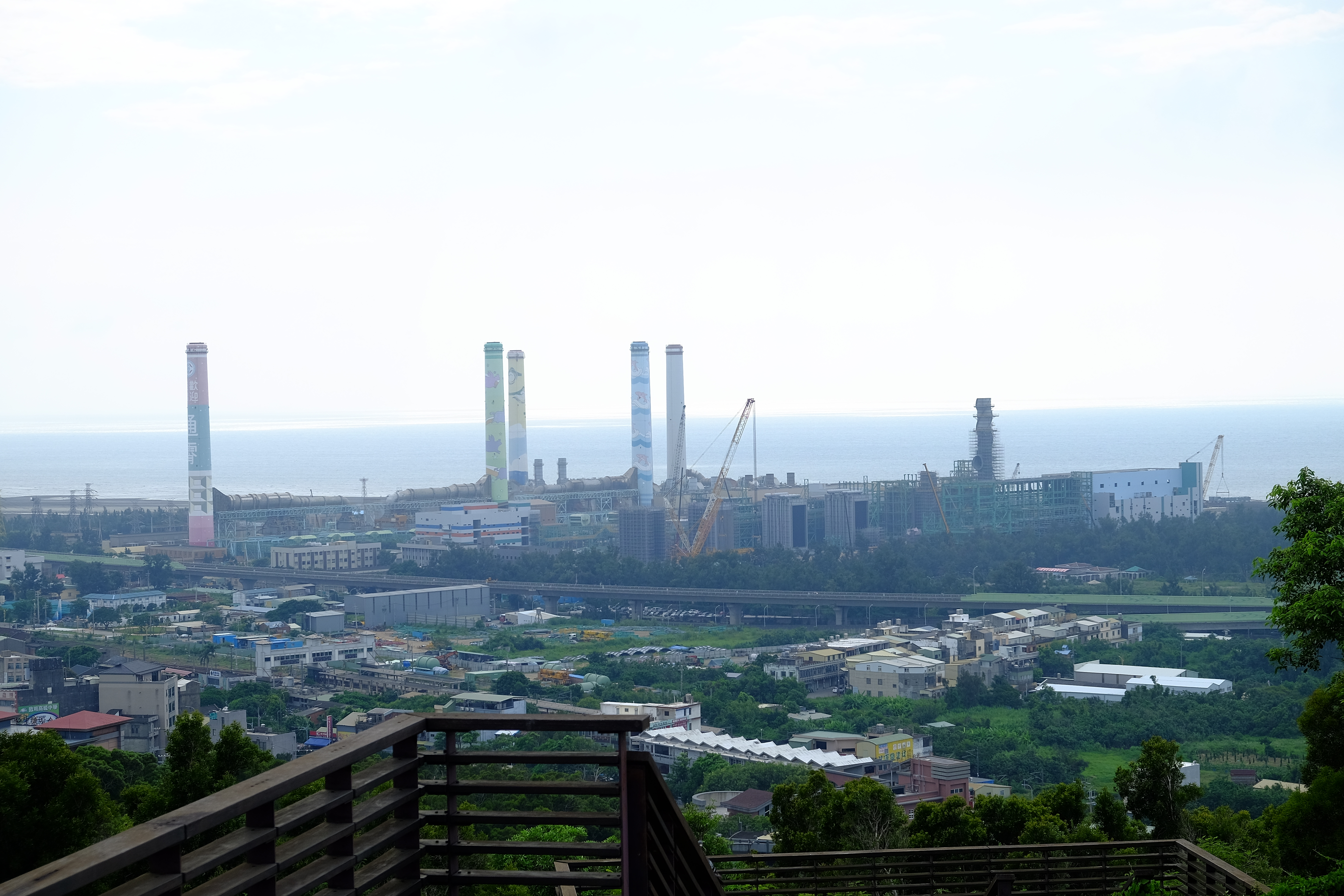 2016年通霄鎮虎頭山公園展望通霄發電廠